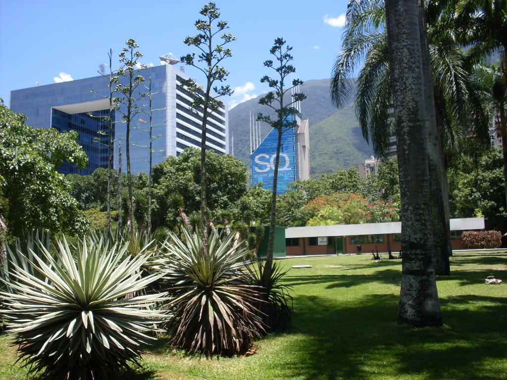 Parque Generalisimo Francisco de Miranda (Parque del Este), en Caracas - Venezuela (2012)